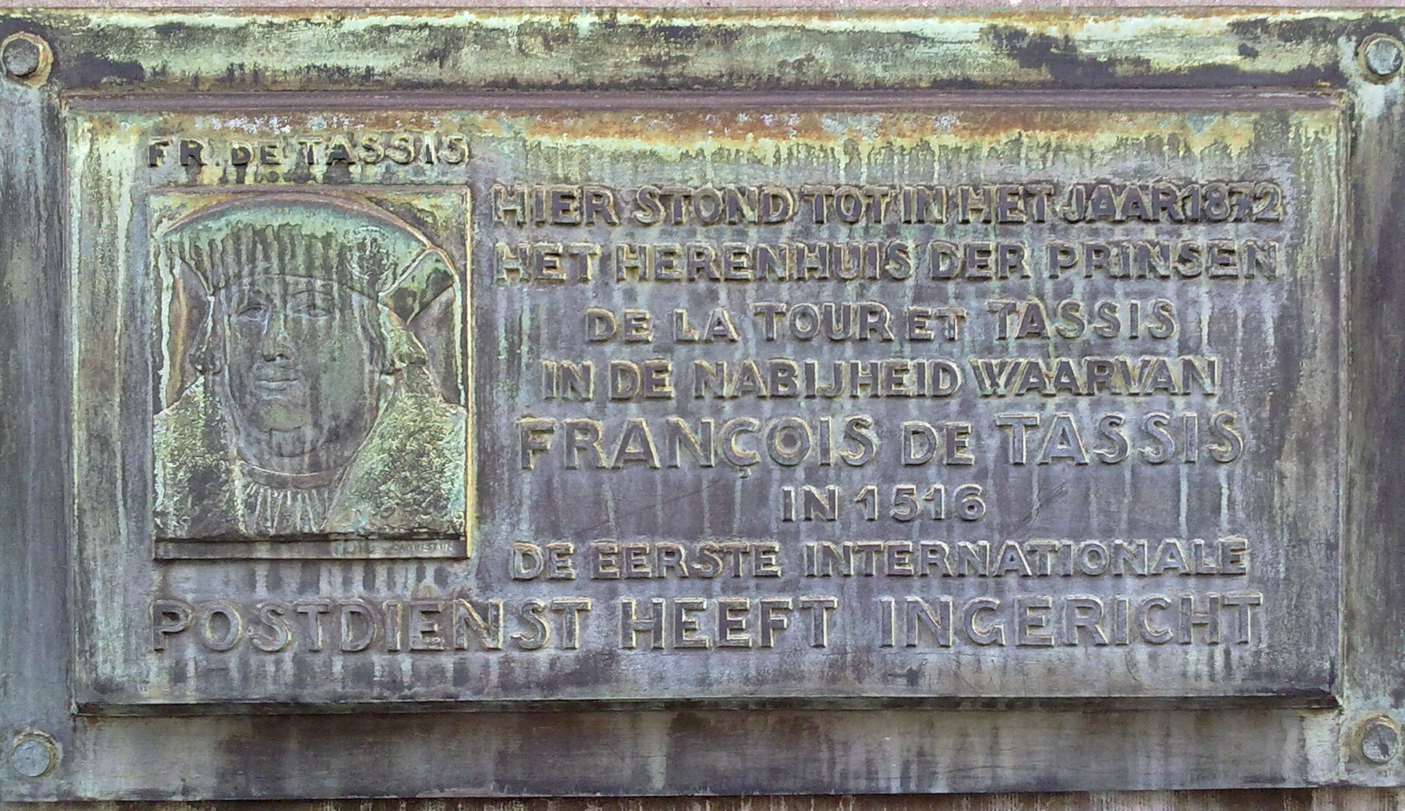 Plaque commémorative des Tour et Tassis à Bruxelles.